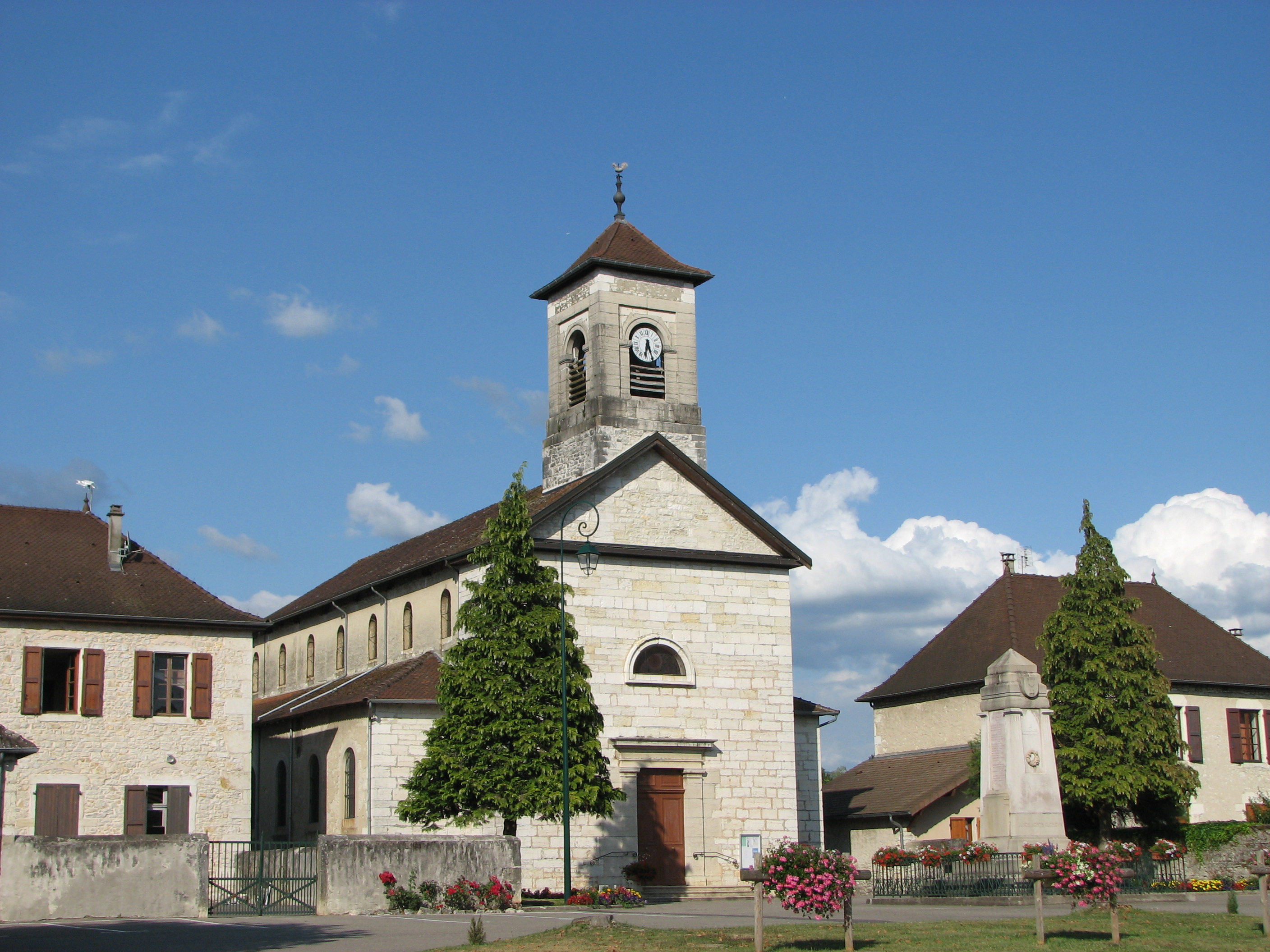 Église du Bouchage (Isère)